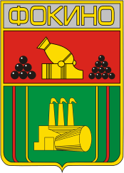 Герб города Фокино, Брянская область